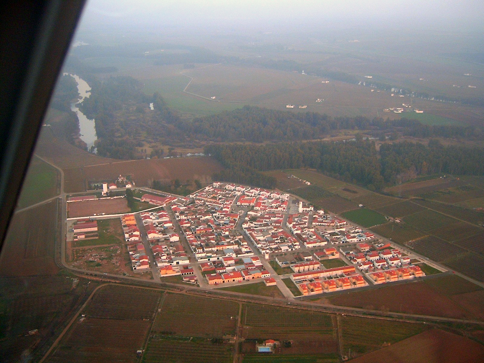 Vista aérea de Barbaño, Badajoz.